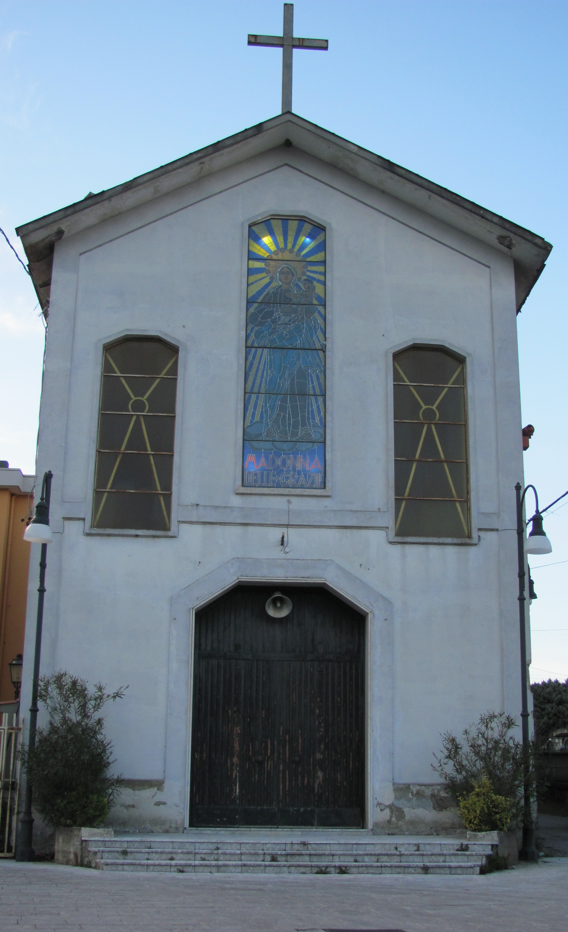 Chiesa di Santa Maria delle Grazie vista frontale SIANO SA dicembre 2010.jpg